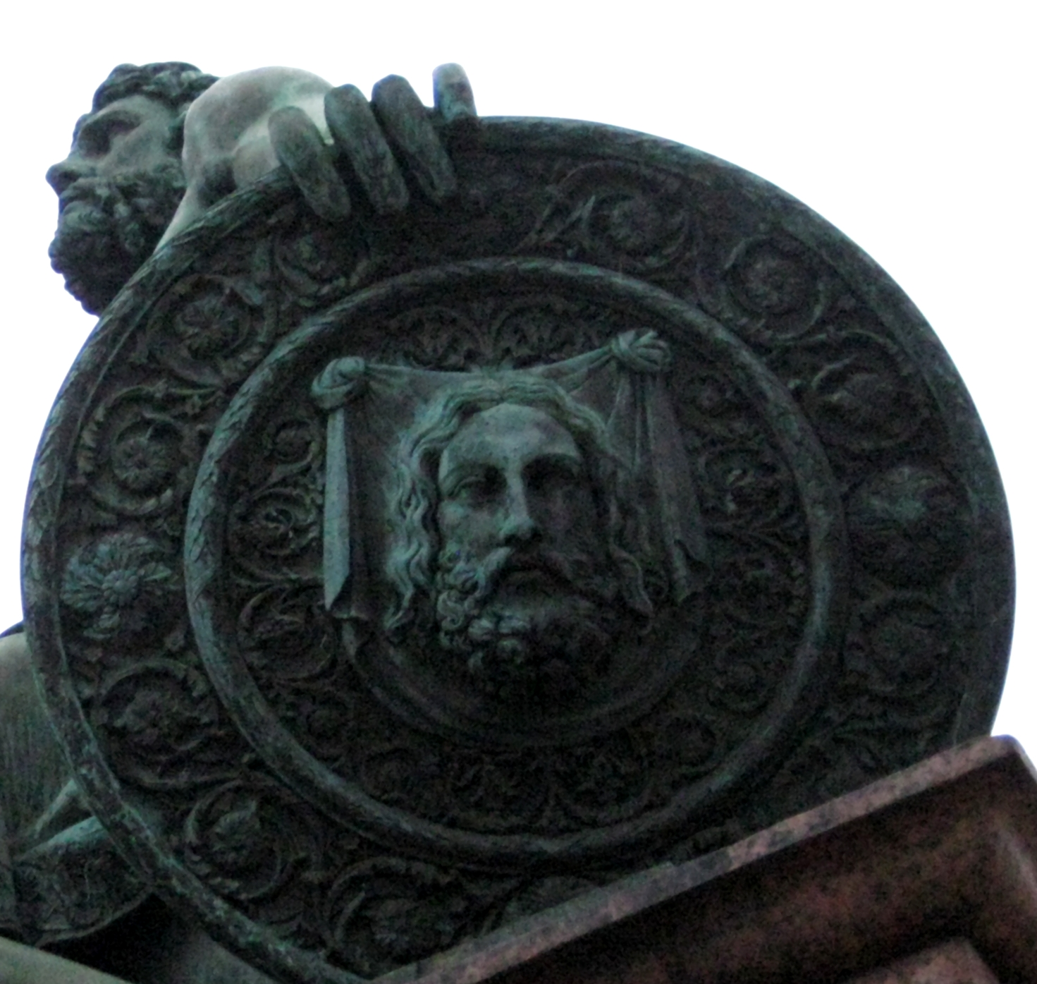 Памятник Минину и Пожарскому.